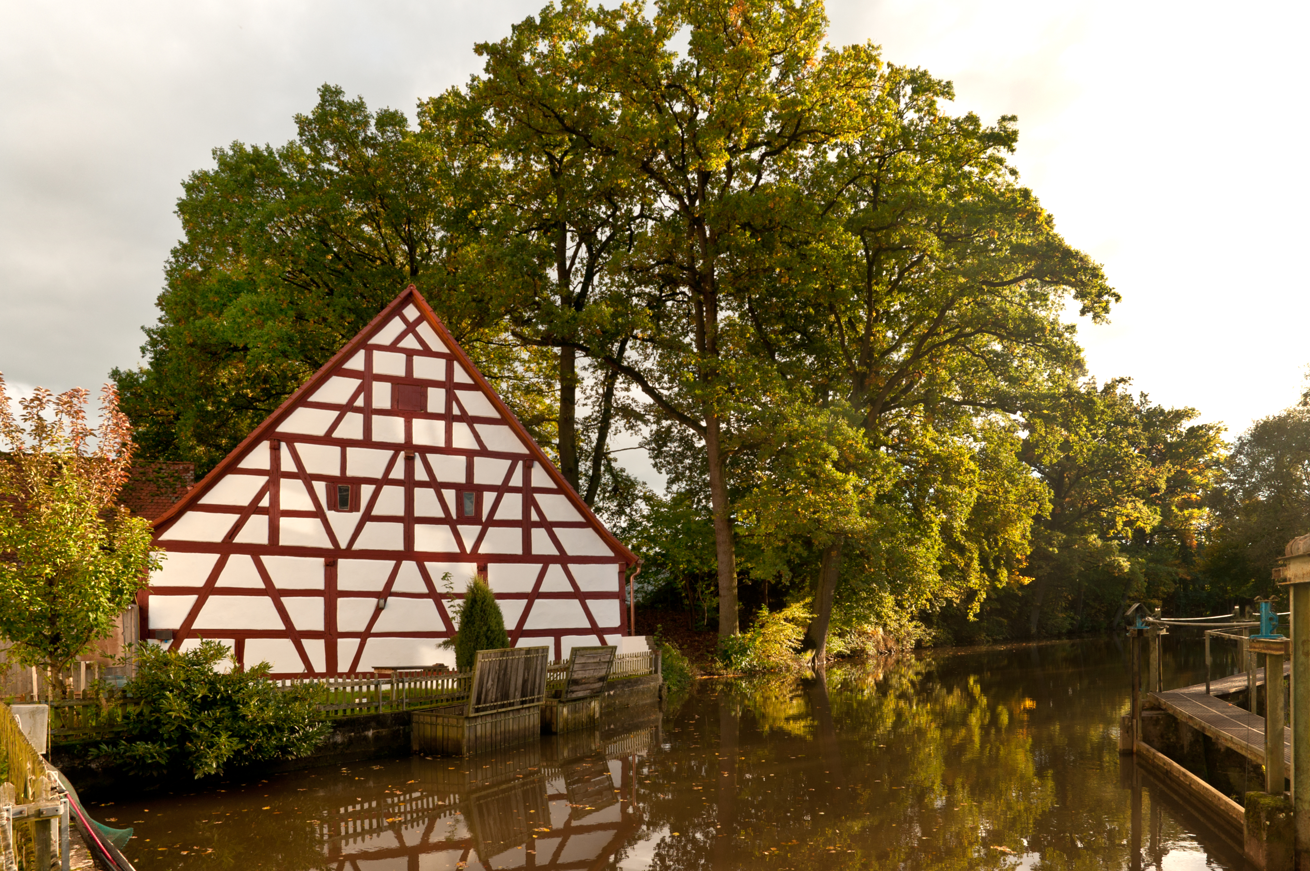 Eingeschossige Fachwerkbauten mit Satteldächern und Schleppgauben, zweite Hälfte 18. JahrhundertThis is a photograph of an architectural monument.